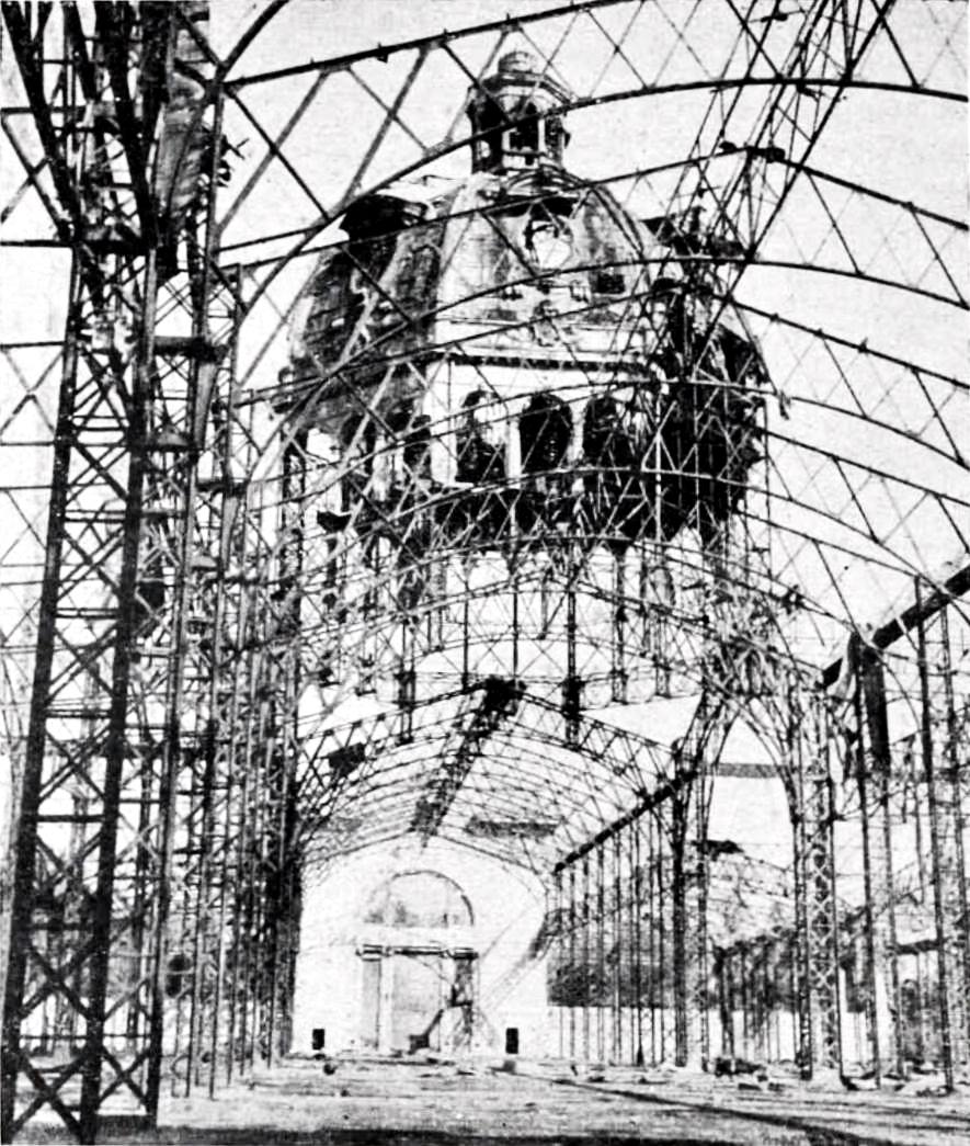 A kiégett Iparcsarnok Budapesten a második világháború után